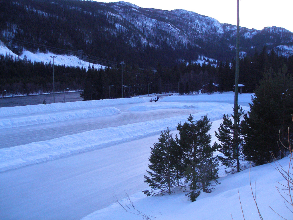 Hol stadion